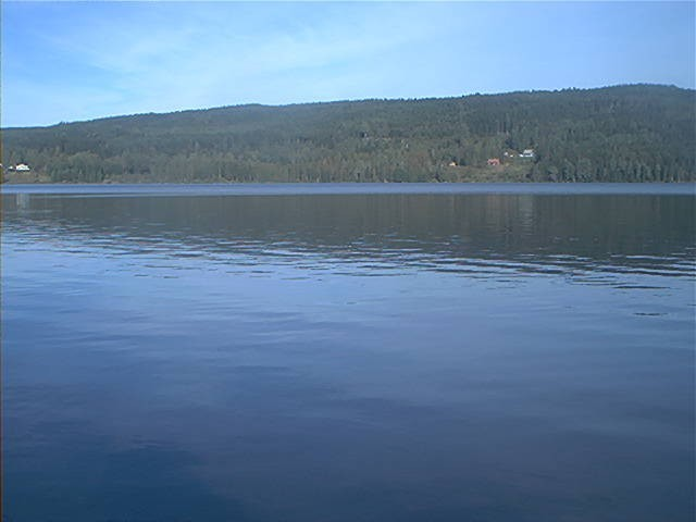 Varaldskogen, med nord-østre Varaldsjøen i forgrunnen.